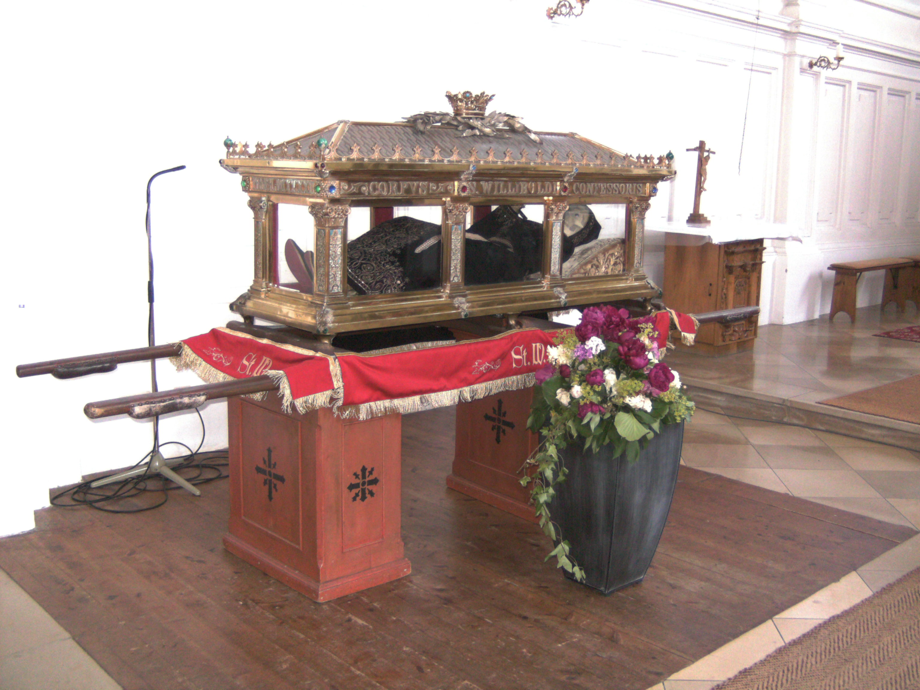 Ganzkörper-Reliquien-Glassargschrein des Heiligen Willebold aufgebahrt in der Kirche St. Konrad in Berkheim. Nach der Fronleichnamprozession.